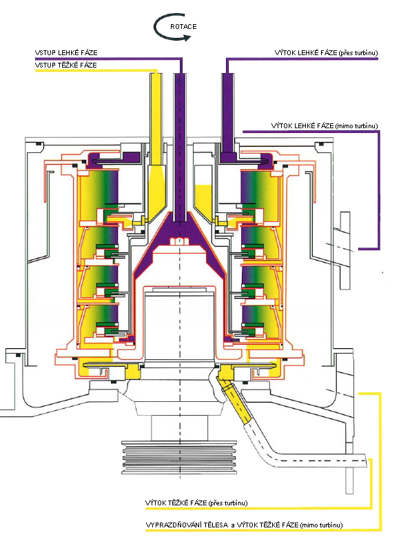 4-stupňový odstředivý extraktor